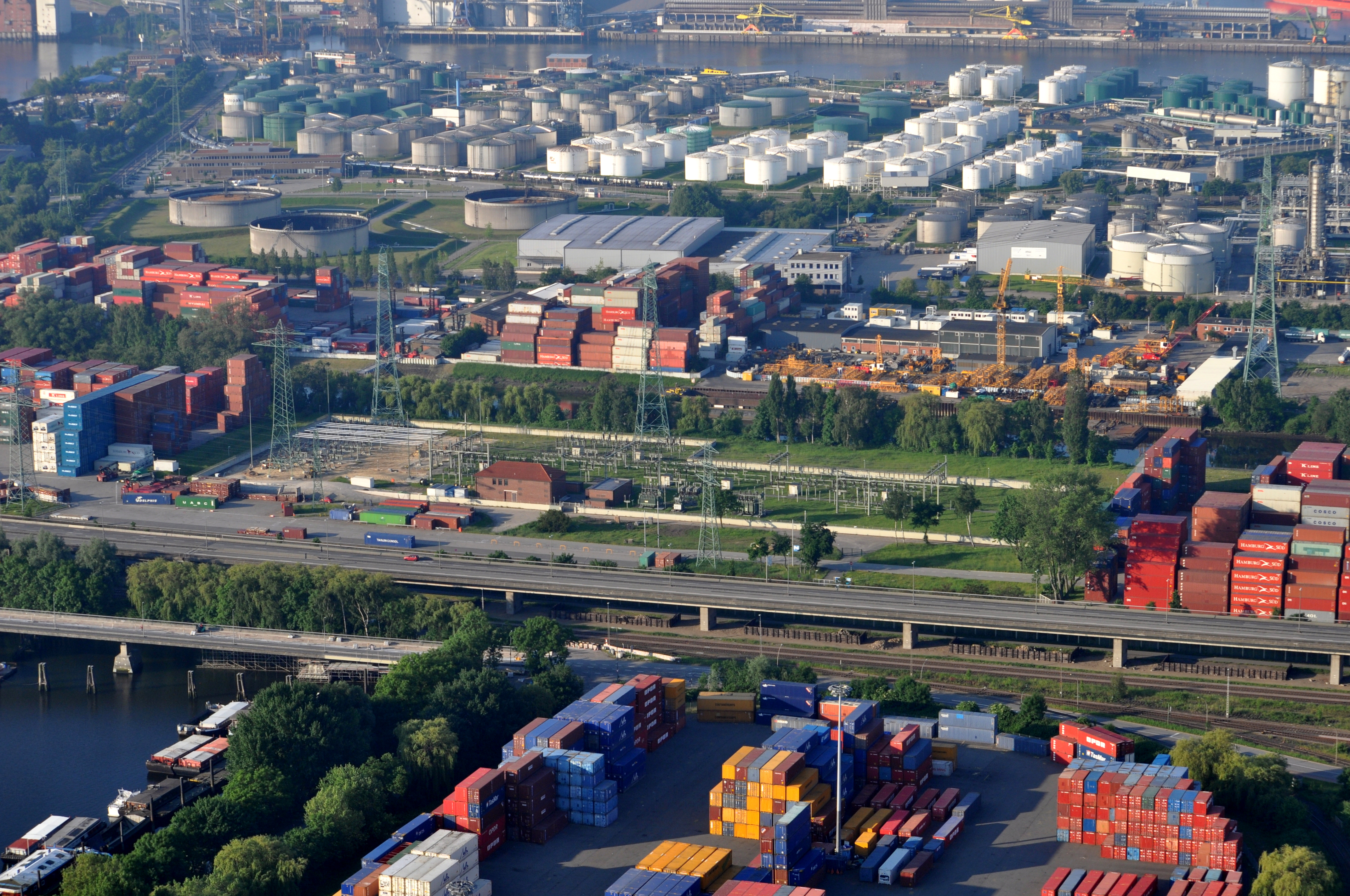 Blick auf die Elbinsel Neuhof in Hamburg, im Hintergrund die Rethe, ein Seitenarm der Elbe.